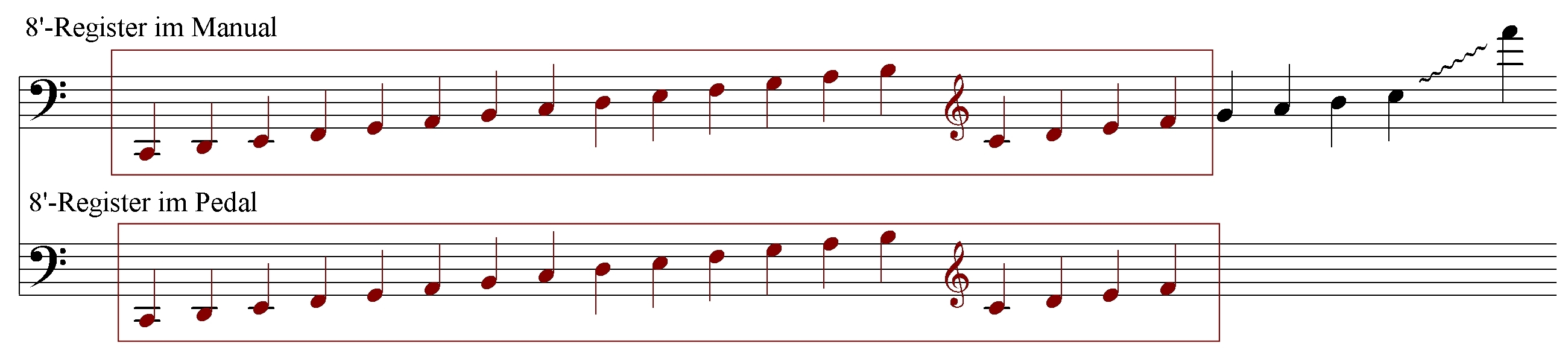 Transmissionsverfahren einer Orgel